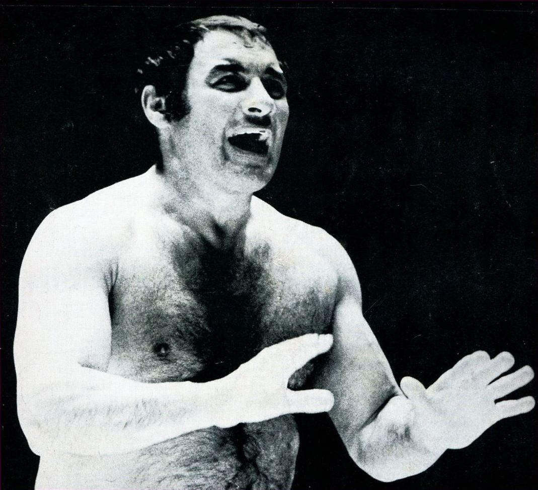 Chris Tolos en couverture du magazine de catch Body Press en septembre 1971.